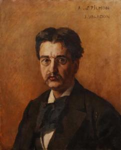 Portrait de Stephen Pichon par Jules Valadon, vendu chez Chayette et Cheval, Paris, le 3 juillet 2017. Huile sur toile, 61 x 50 cm. Exposé à la galerie Georges Petit en 1893 (exposition Portraits des écrivains et journalistes du siècle organisée par la Société des journalistes parisiens).